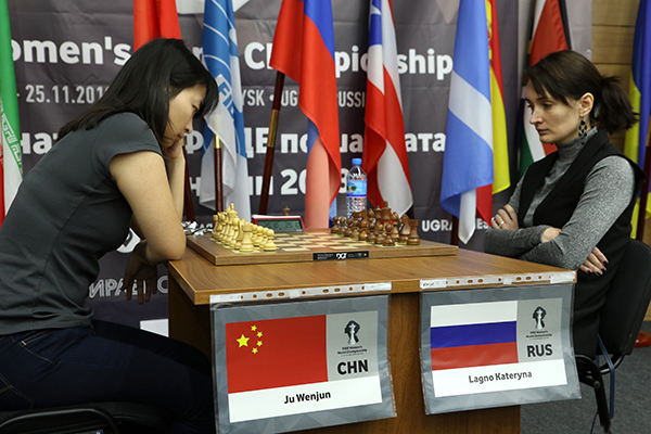 Цзюй Вэньцзюнь и Екатерина Лагно на тай-брейке финального матча Чемпионат мира по шахматам среди женщин 2018 в Ханты-Мансийске